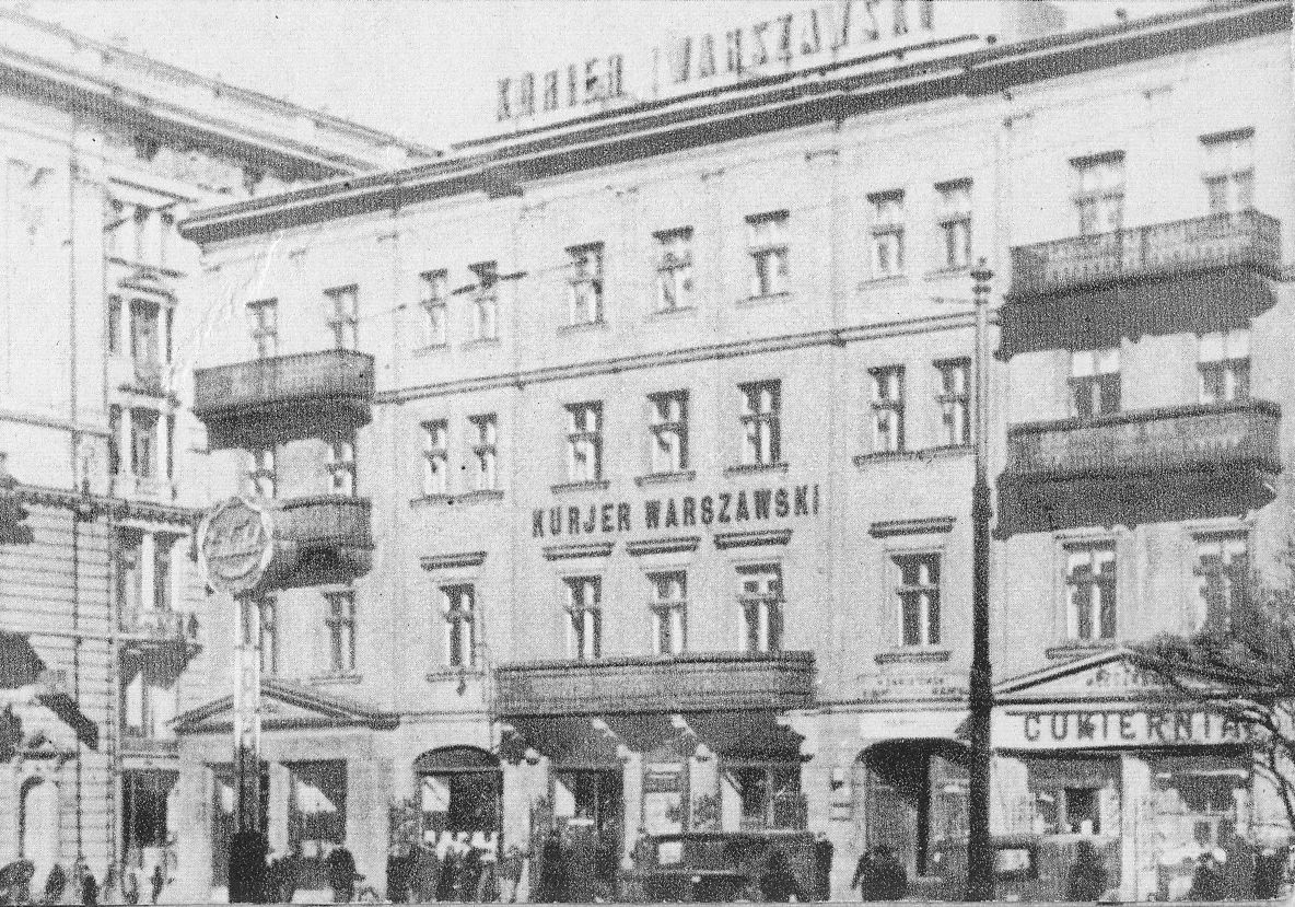 Kamienica przy ul. Krakowskie Przedmieście 40, siedziba "Kuriera Warszawskiego"